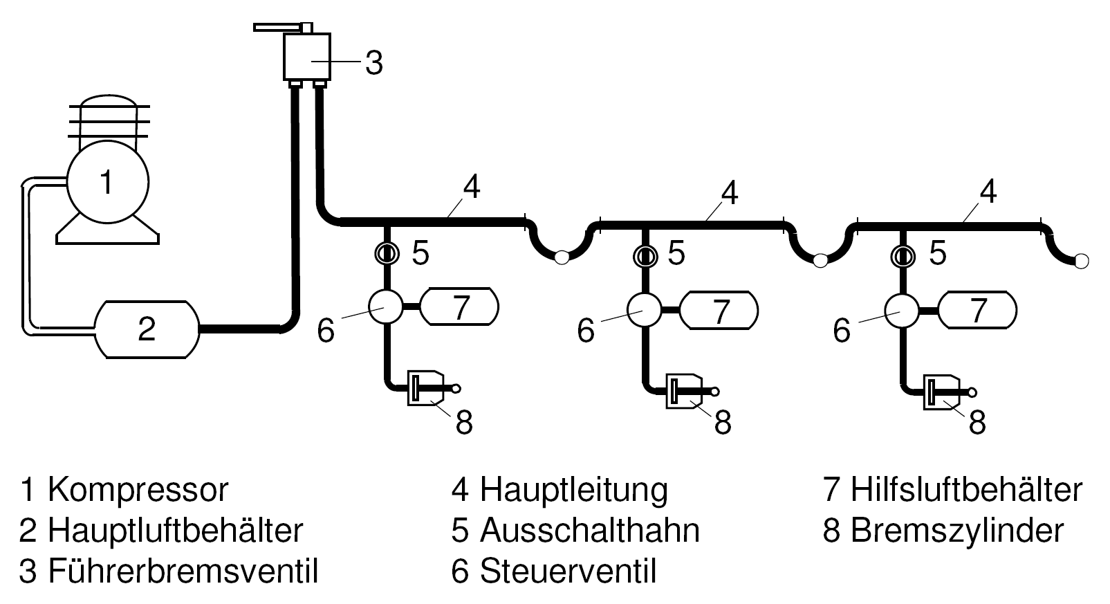 Fahrzeuge mit automatischer Druckluftbremse sind mindestens ausgerüstet mit Hauptleitung, Ausschalthahn, Steuerventil mit bzw. ohne Steuerbehälter, Hilfsluftbehälter und Bremszylinder. Triebfahrzeuge sind zusätzlich ausgerüstet mit Kompressor, Hauptluftbehälter und Führerbremsventil, gegebenenfalls mit Rangier- und Anhängerbremsventil. Die automatische Druckluftbremse wird auch als indirekt wirkende Bremse bezeichnet, da die Druckluft dem Bremszylinder indirekt über das Steuerventil aus dem Hilfsluftbehälter zugeführt wird, welches durch den Hauptleitungsdruck gesteuert ist.